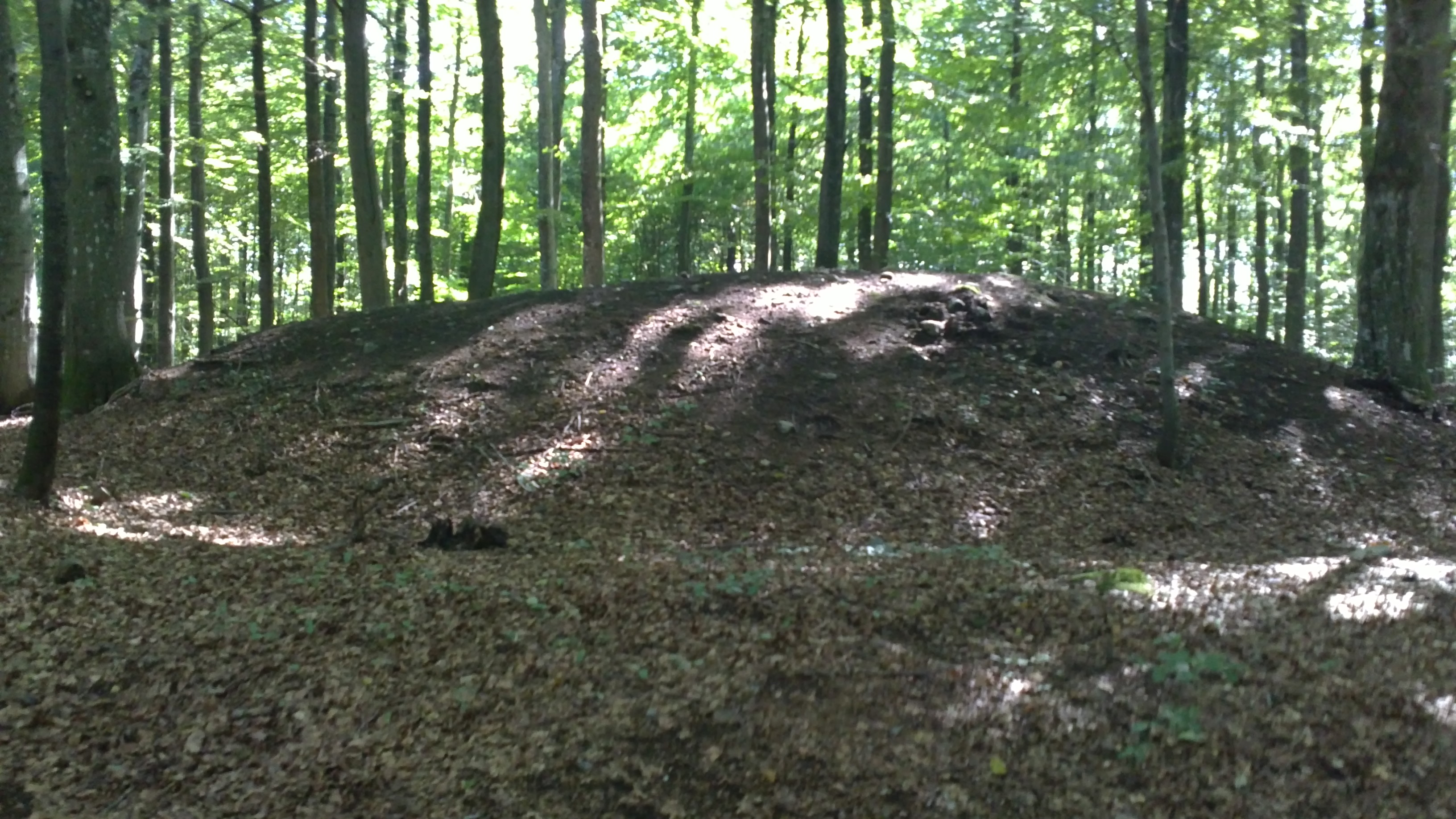 Bilde fra Øvre gravfelt, Bøkeskogen